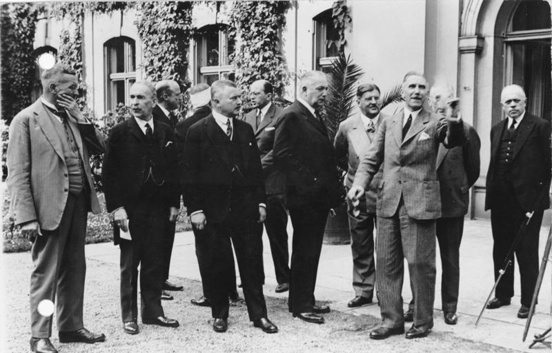 Die ersten offiziellen Besprechungen der neuen Reichsregierung im Garten der Reichskanzlei ! [ Juni 1932] Das neue Reichskabinett im Park der Reichskanzlei, von rechts nach links: Reichswirtschaftsminister Prof. Dr. [Hermann] Warmbold [verdeckt: von Gayl /Inneres] Reichskanzler [Franz] von Papen Reichsaussenminister [Konstantin] von Neurath Reichsernährungsminister [Magnus] von Braun [Eltz von Rübenach / Verkehr] Finanzminister Dr. [Franz] Gürtner Information added by Wikimedia users.Kabinett Papen 1. Juni 1932 - 3. Dezember 1932